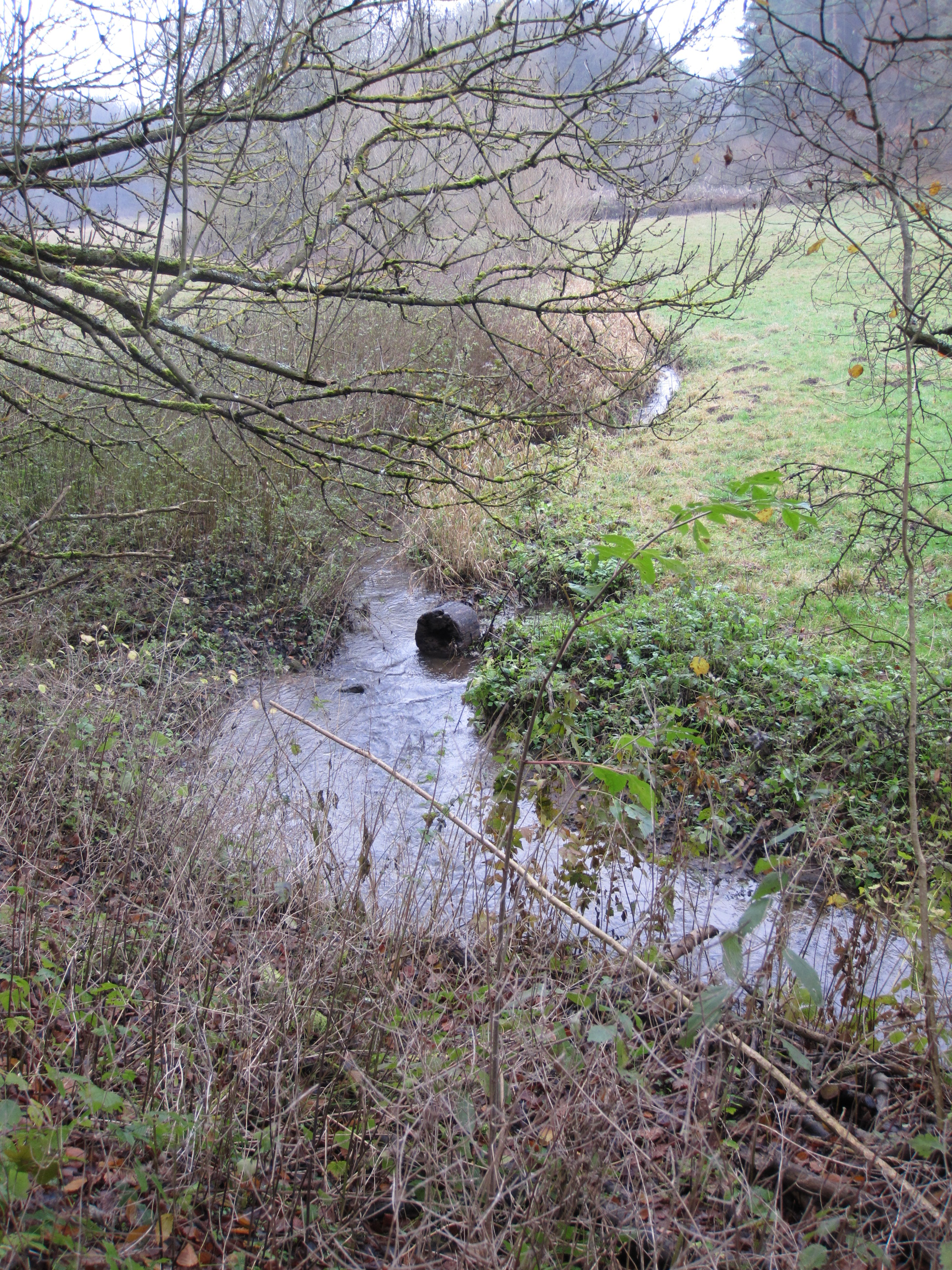 Lampertsbach vor Bachschwinde